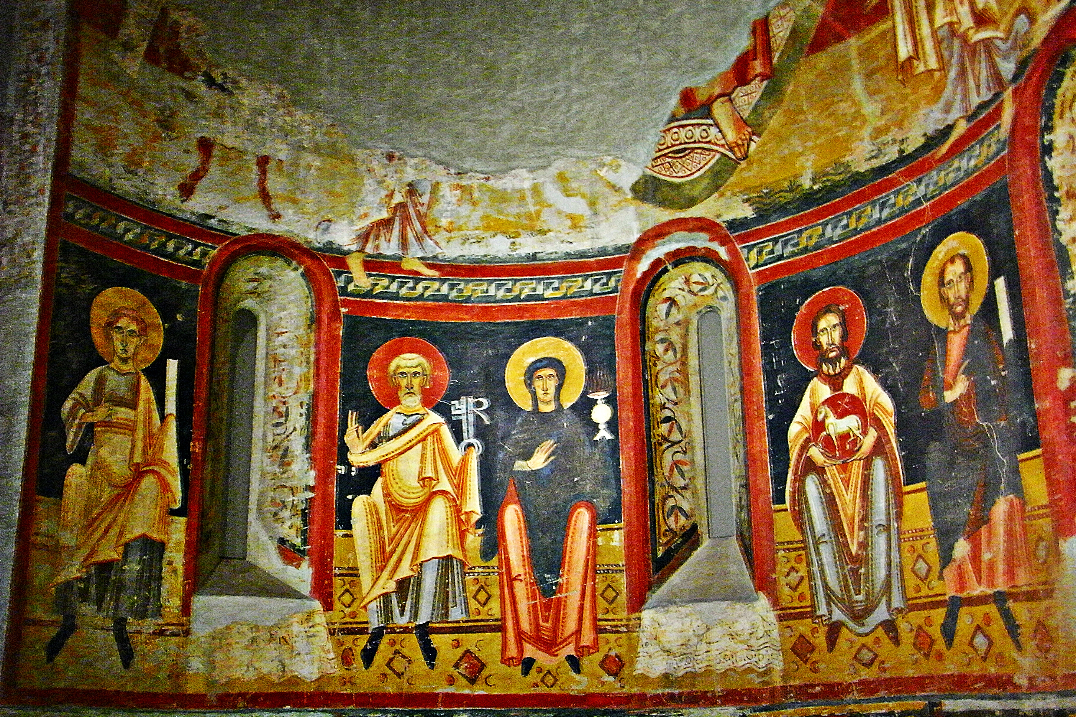 Monestir de Sant Pere del Burgal (La Guingueta d'Àneu)